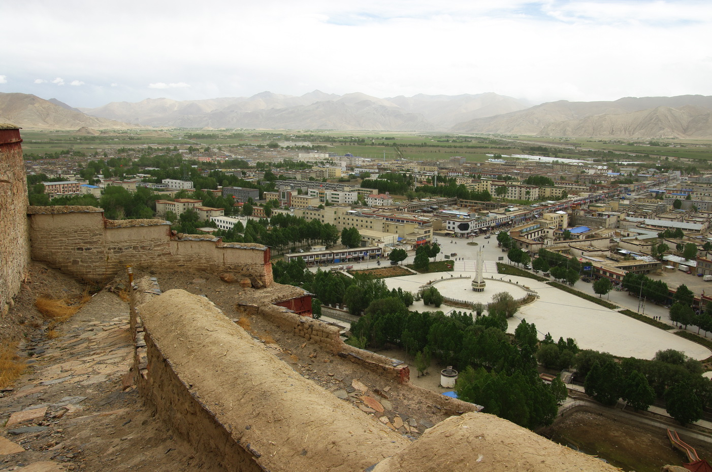 Gyantse vom Dzong gesehen